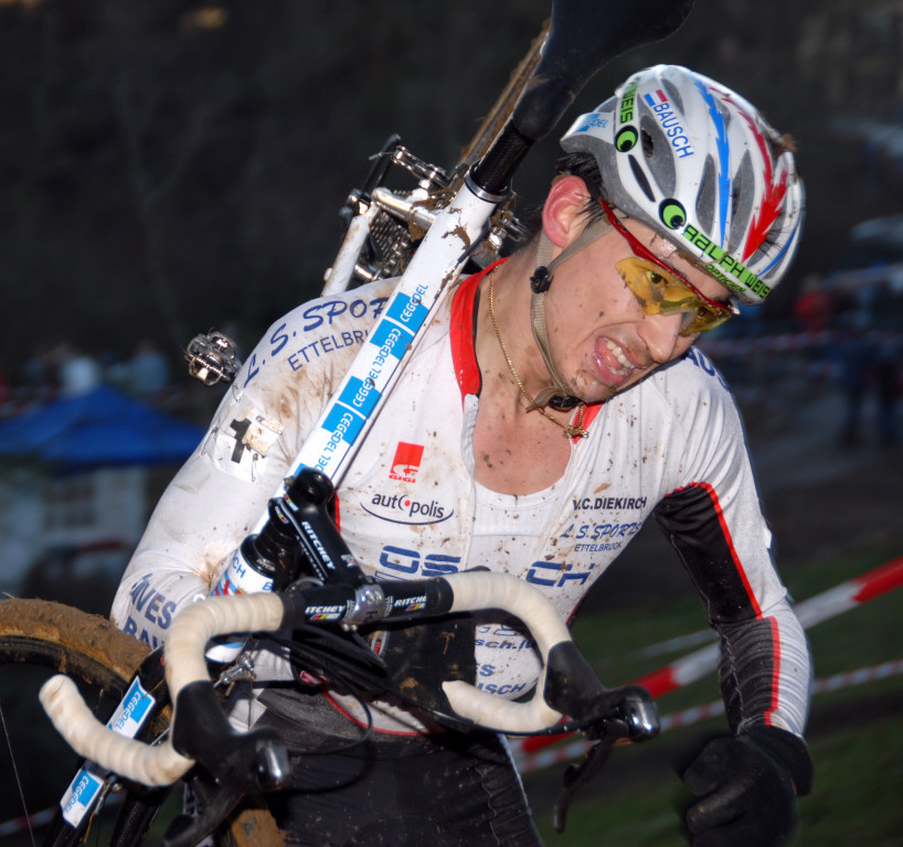 Bausch Gusty (Cyclo-Cross-Landesmeeschterschaft 2008 zu Conter) Auteur: Fliedermaus Source: Eege Photo vum 6. Januar 2008